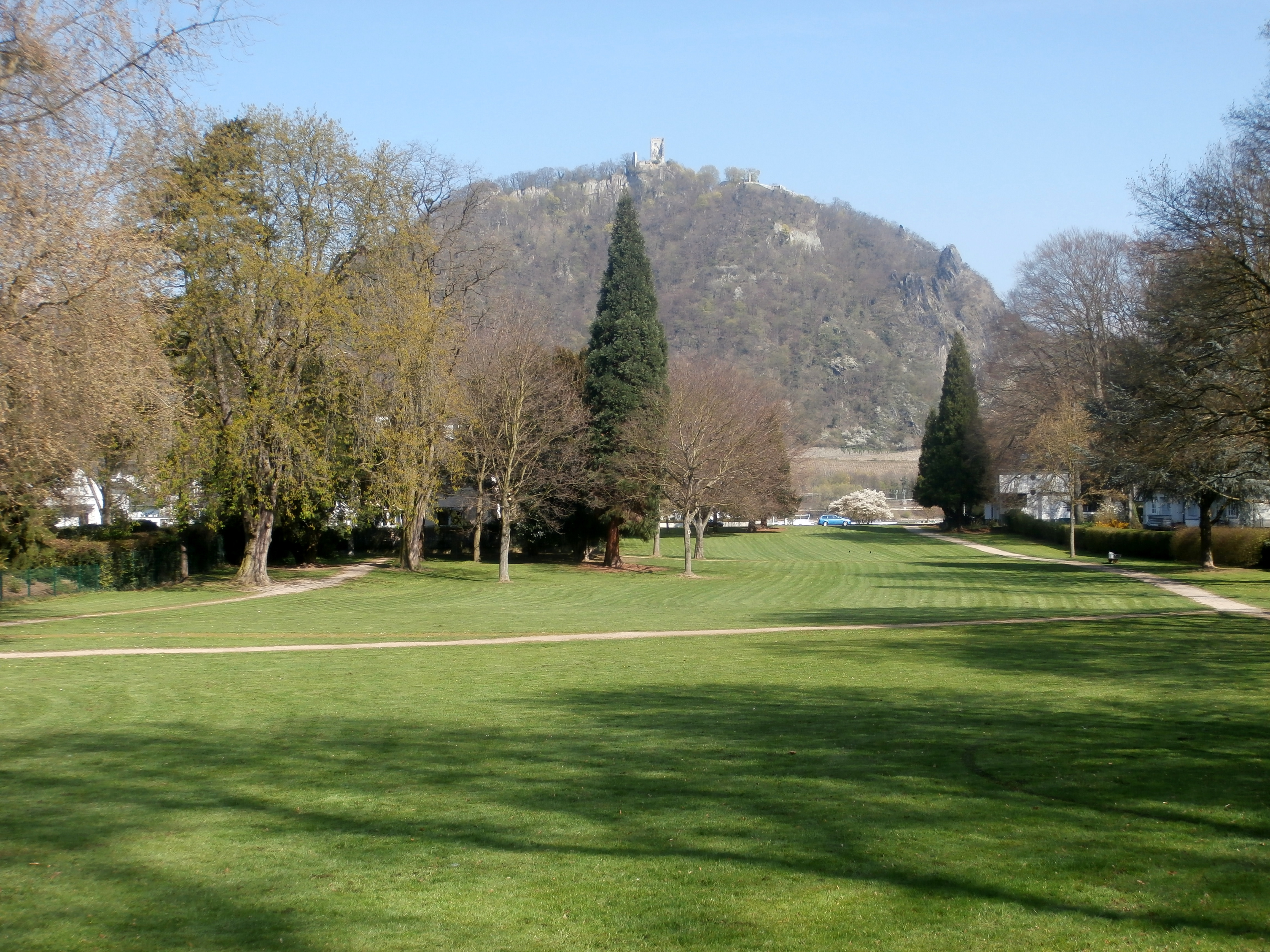 Drachensteinpark zwischen Nibelungenstraße und Mainzer Straße, Mehlem, Bad Godesberg; im Hintergrund der Drachenfels